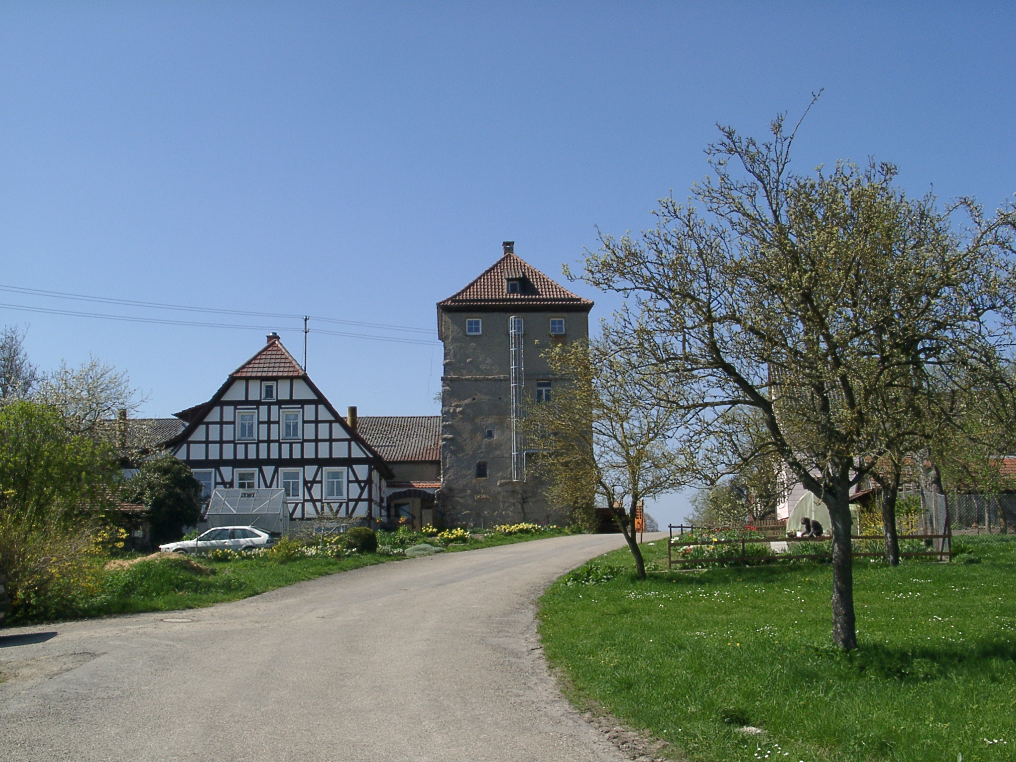 Landturm bei Hörlebach (Gemeinde Wolpertshausen)